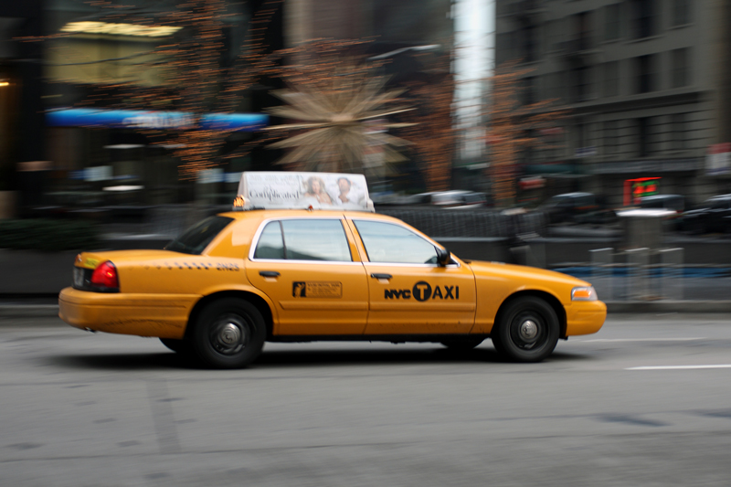 taxi